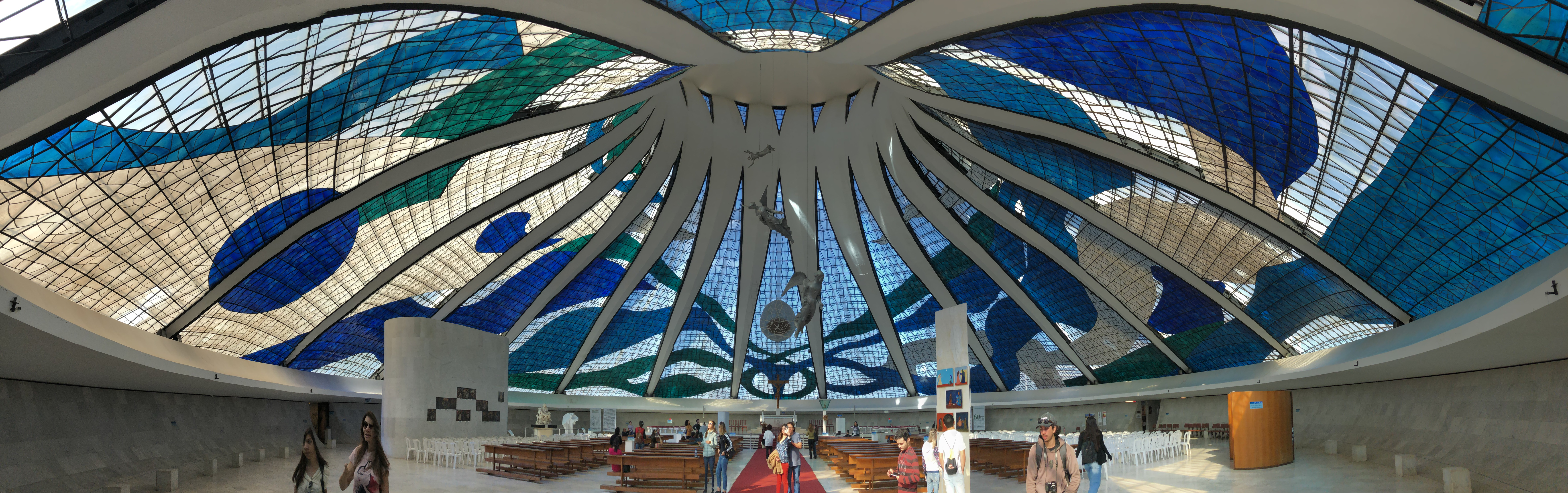 Imagem panorâmica do interior da Catedral de Brasília tirada em uma viagem institucional